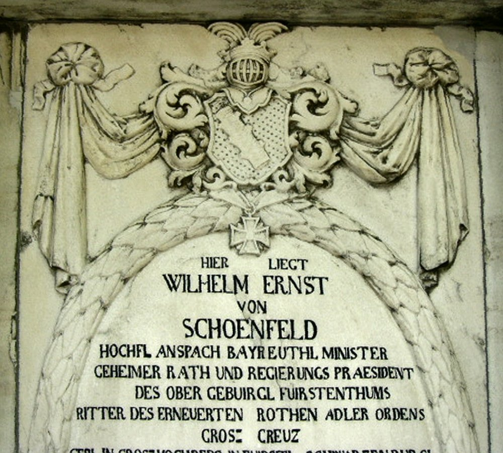 Grabplatte des Wilhelm Ernst von Schönfeld, Mitglied im Roten Adlerorden, auf dem Bayreuther Friedhof